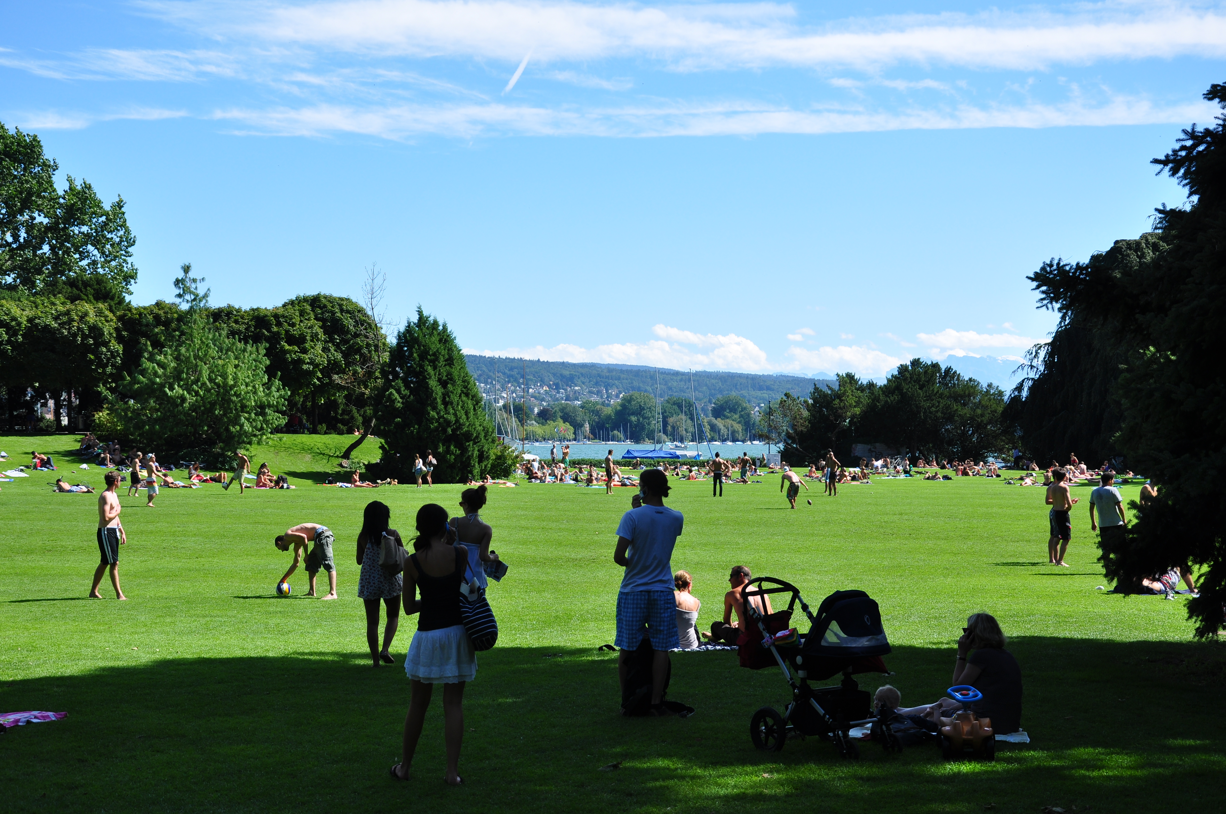 Arboretum in Zürich-Enge (Switzerland)